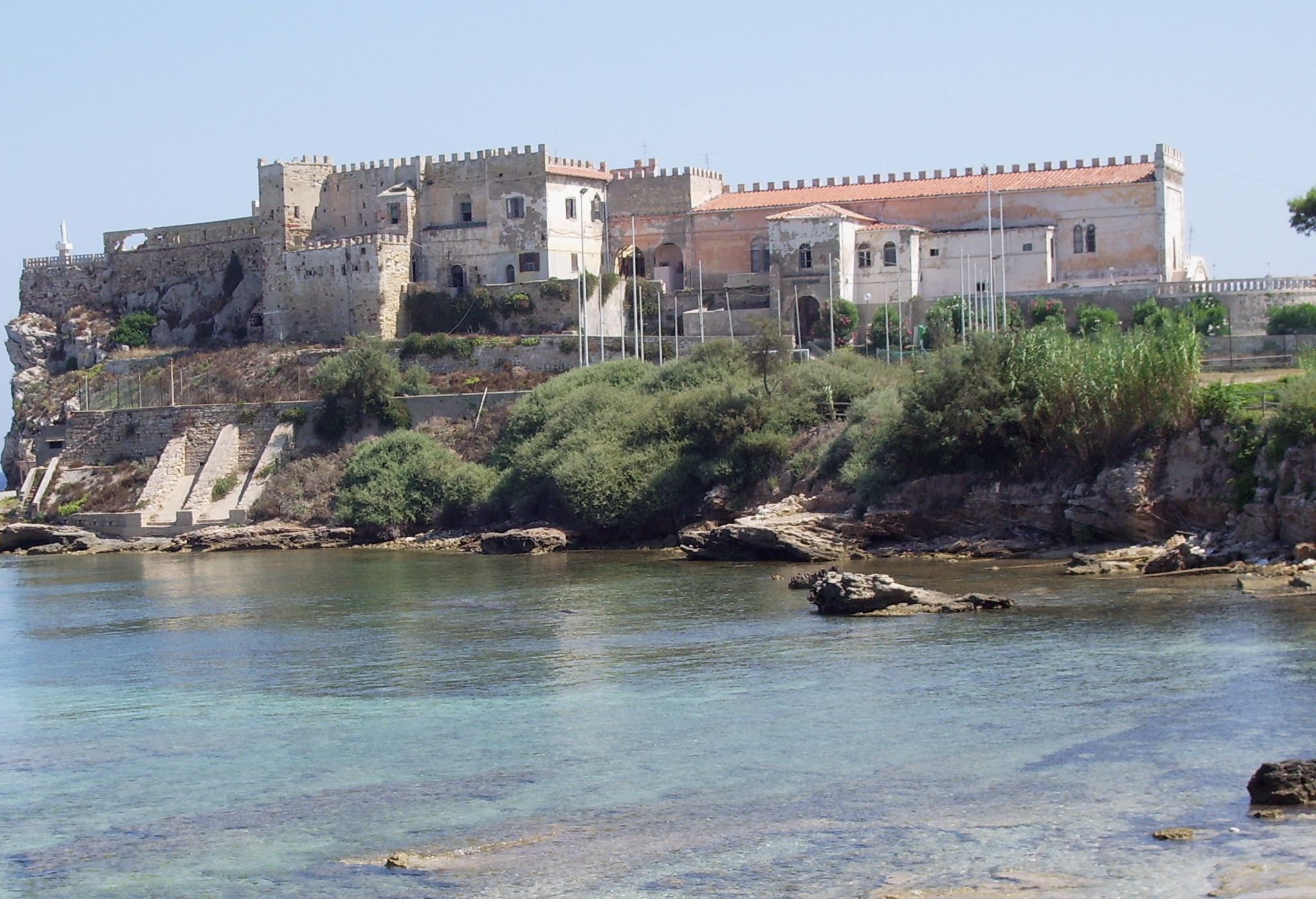 Il Forte Teglia sull'Isola di Pianosa (LI)